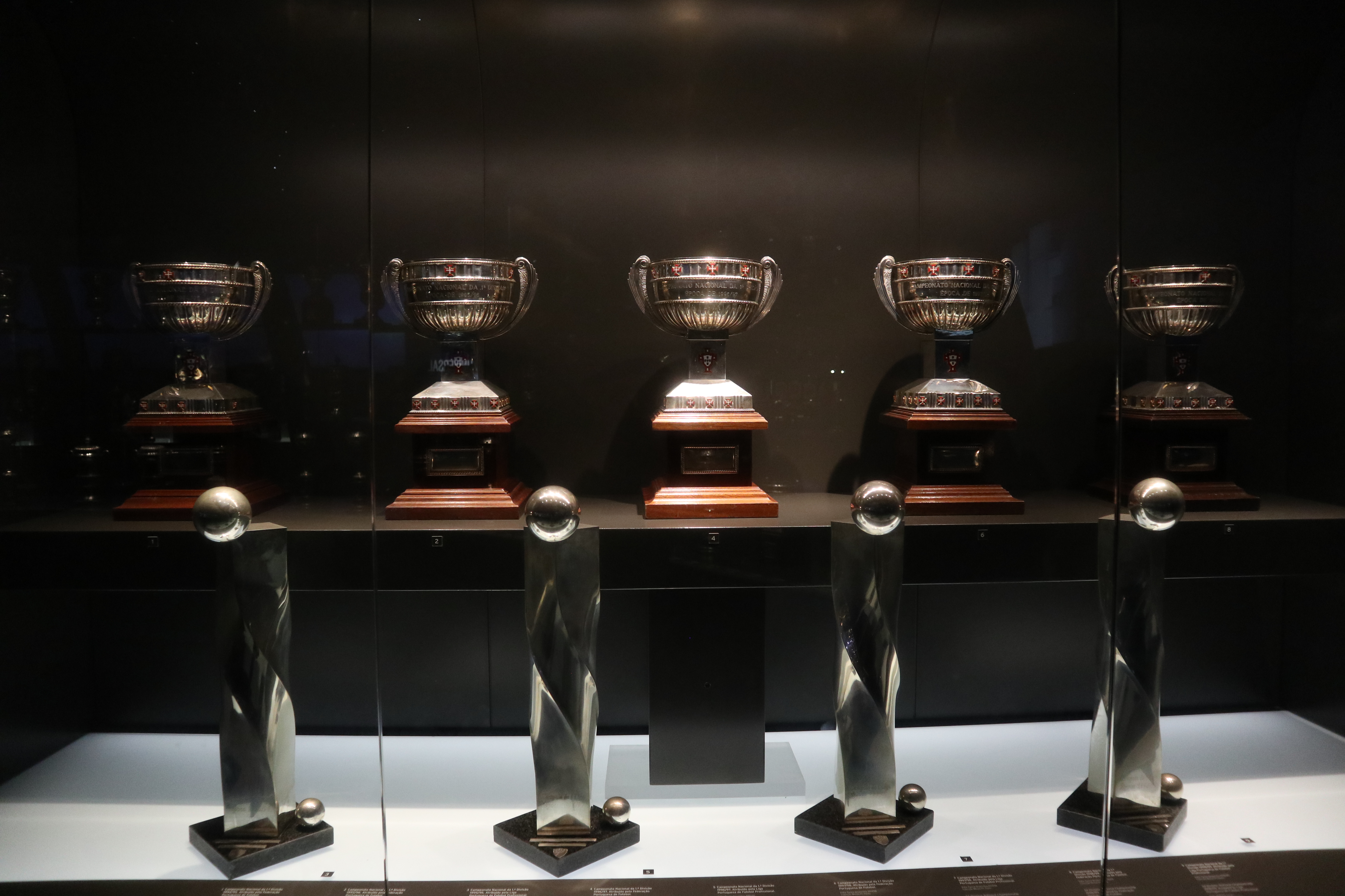 As 5 taças do FC Porto, conquistando assim o pentacampeão